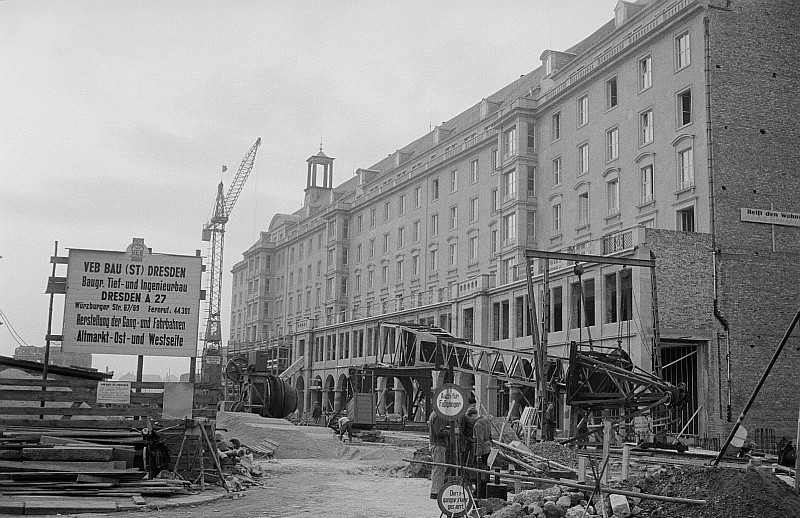 Original image description from the Deutsche FotothekAufbauarbeiten am Dresdner Altmarkt, Westseite